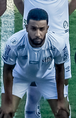 (Santos - SP, 16/11/2019) Partida de futebol Santos e São Paulo na Vila Belmiro. Foto: Isac Nóbrega/PR